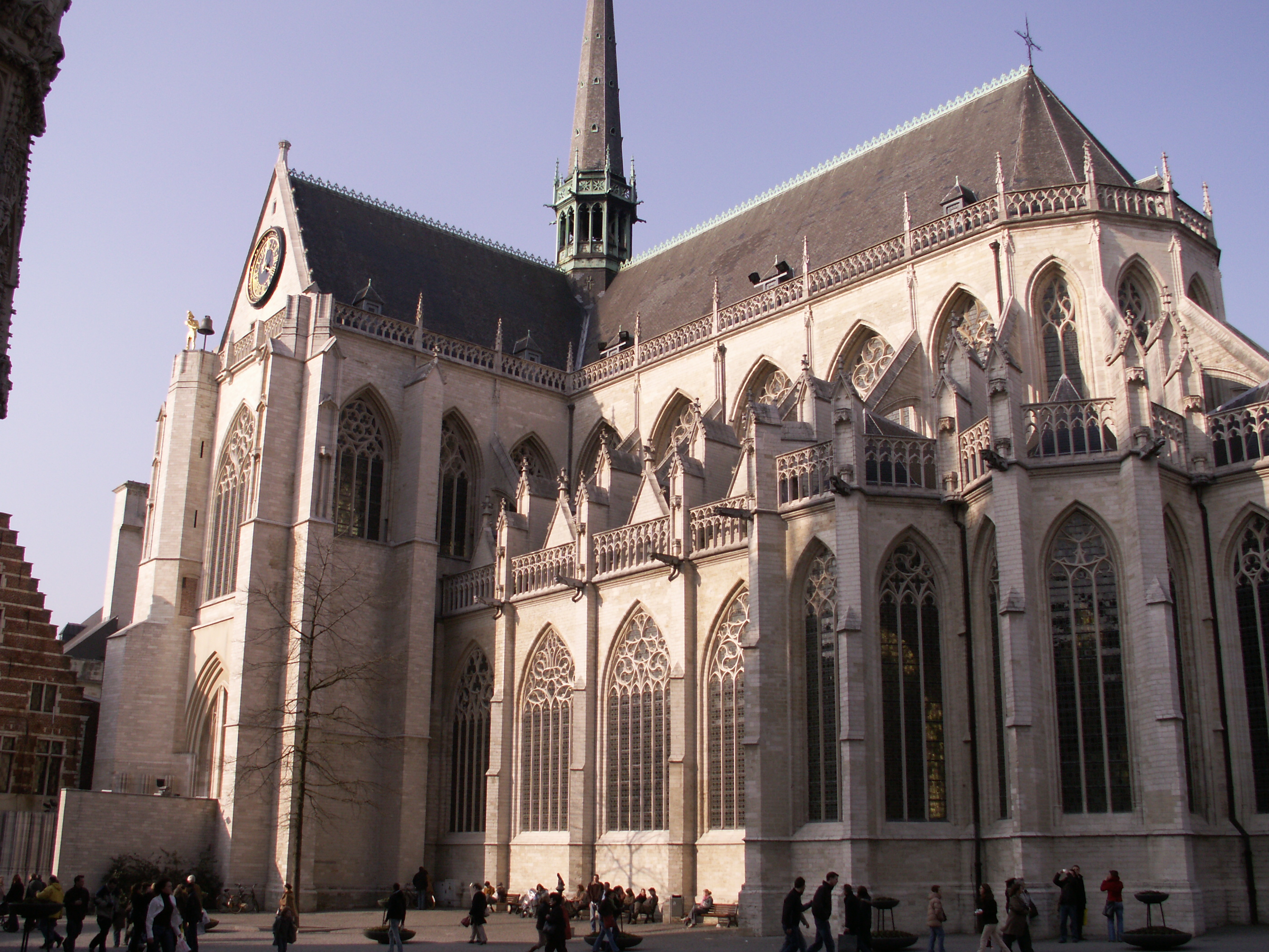 Sint-Pieterskerk (Leuven, Belgium)